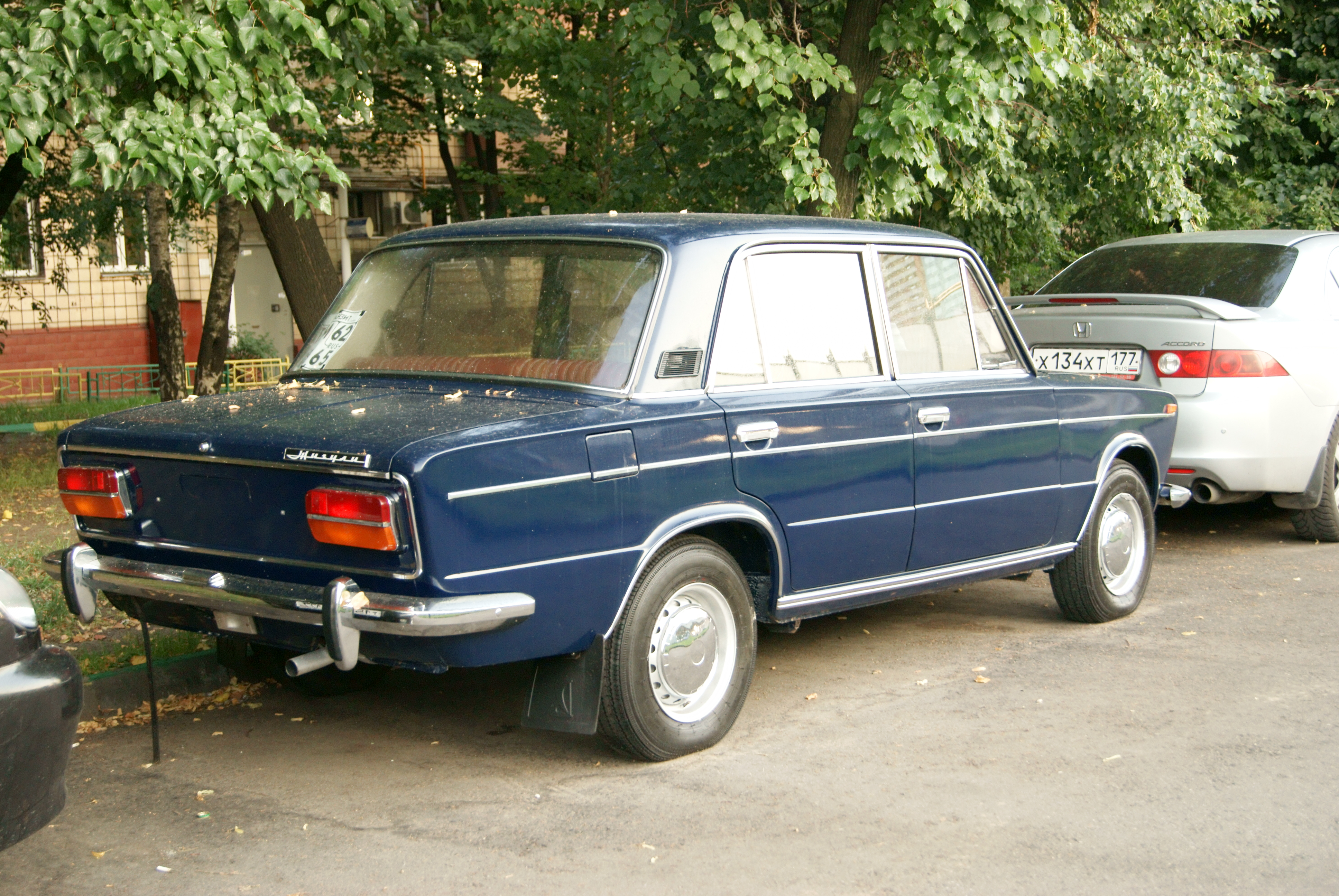 Blue VAZ-2103.